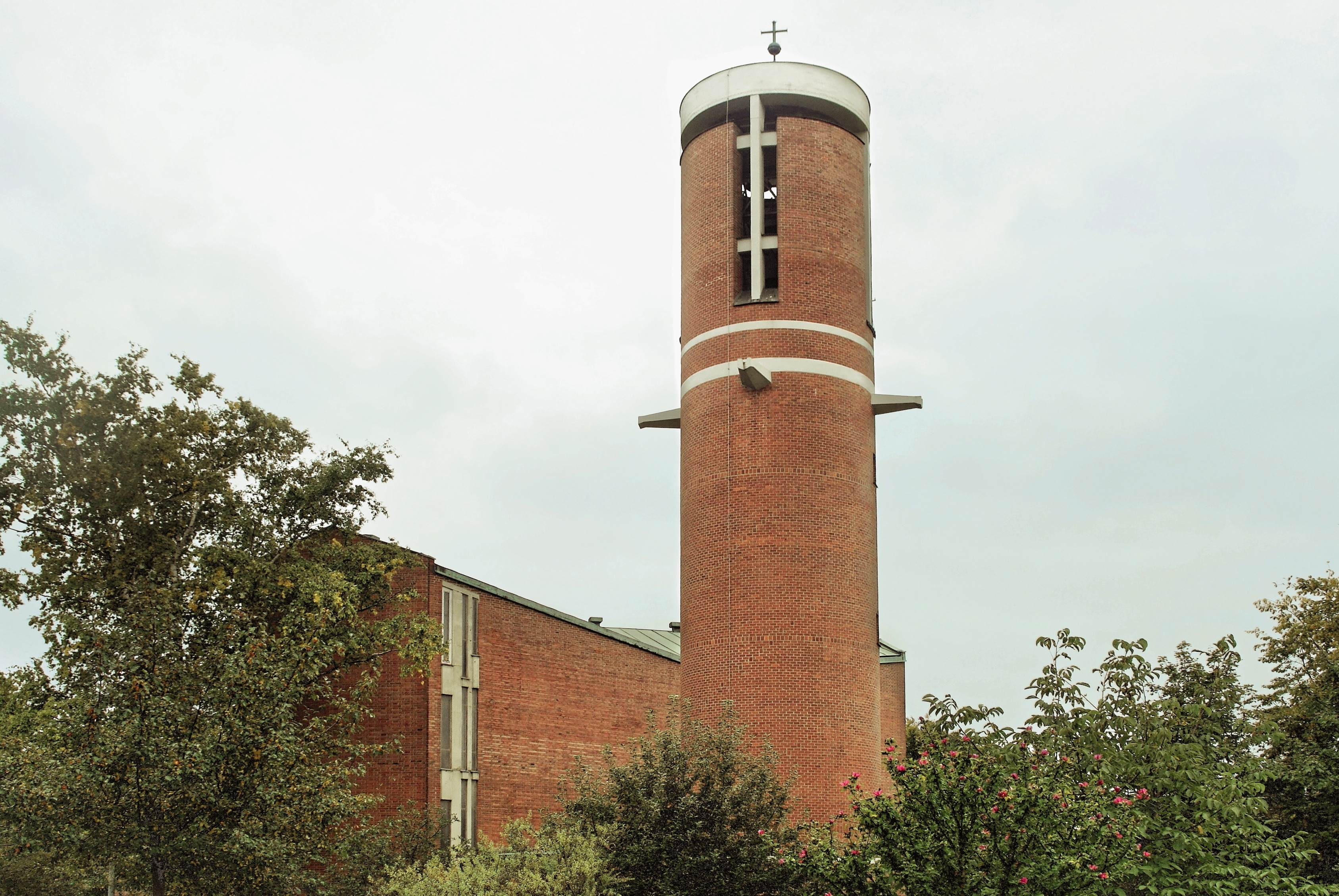 Evang.-Luth. Thomaskirche, Augsburg Kriegshaber